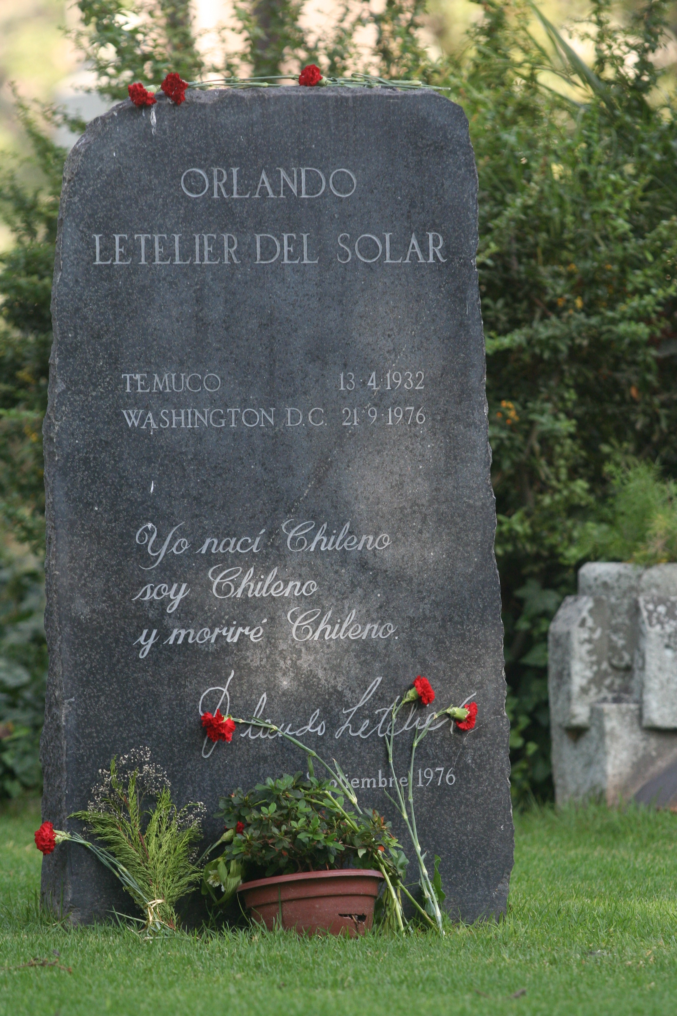 Memorial conmemorativo de la violación de los DDHH en Chile durante el régimen de Pinochet